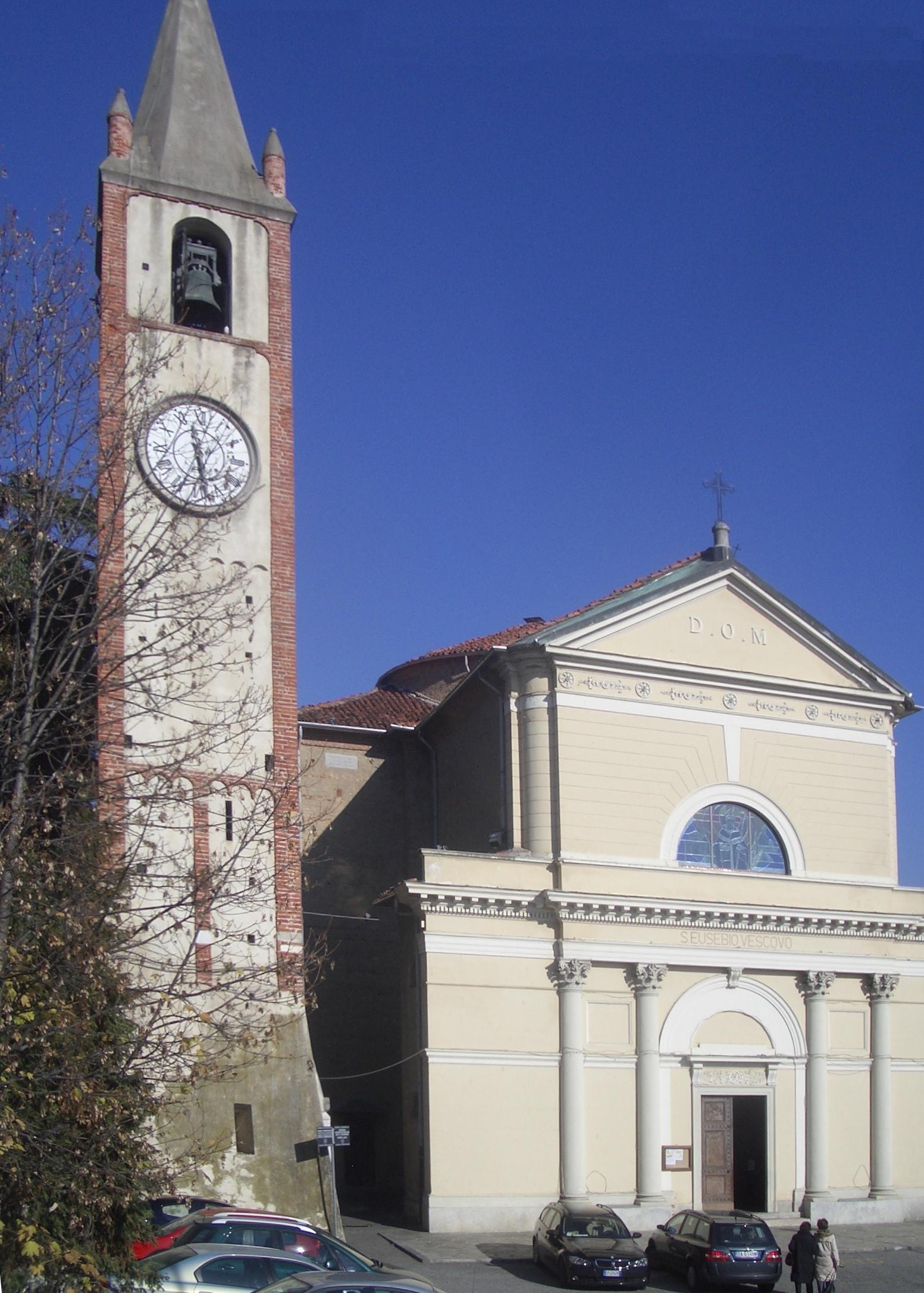 Sant'Eusebio parish church , Moncrivello, Vercelli, Italy